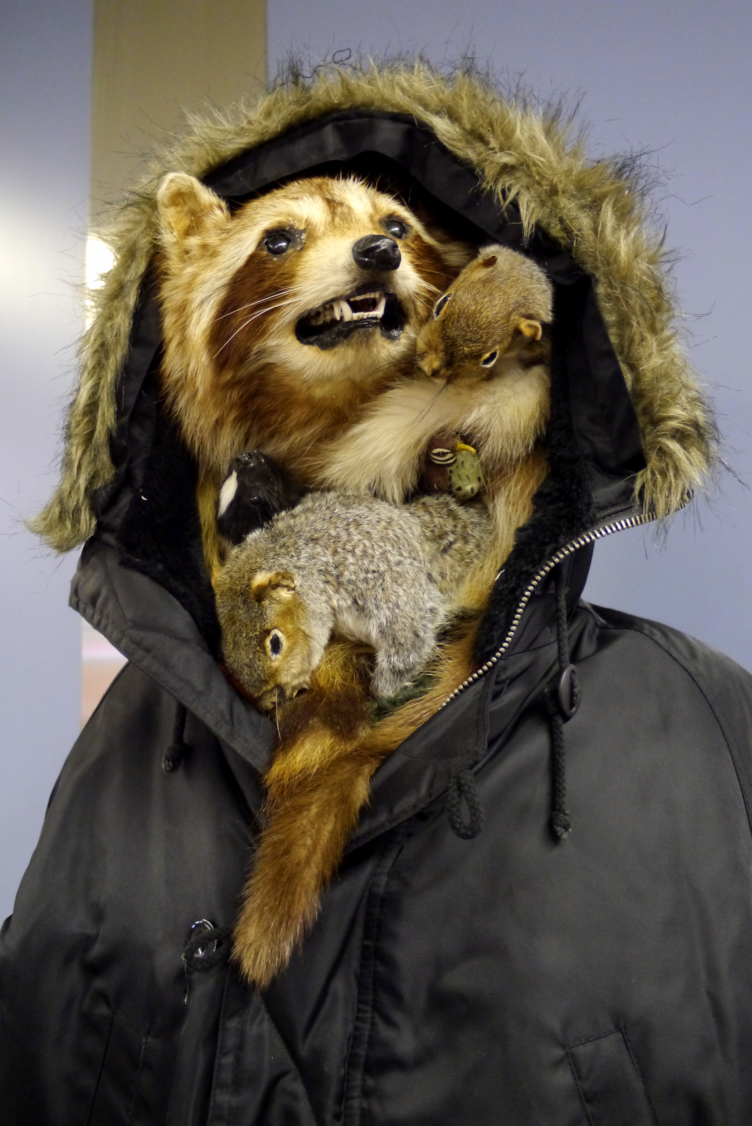 Sculpture Une réflexion ludique sur la relation entre humains et animaux. Art Souterrain Zone 11: Gare Centrale Le Passager est un reflet ludique de la relation entre humains et animaux dans l’environnement urbain. La sculpture semble être une autre banlieue de transit, mais une fois le spectateur assez proche du parka à capuche, il découvre que ce n’est pas une personne, mais plutôt une série d’animaux debouts sur le dos les uns des autres, emmitouflés dans des vêtements et travaillant ensemble pour mimer un humain. The Passenger is a playful reflection on the relationship between humans and animals in the urban environment. The sculpture will appear to be just another commuter in transit; however, once the viewer gets close enough to glance into the hooded parka they will discover that it is not a person but a series of animals standing on each others’ backs, bundled up in clothing and working together to mimic a human.